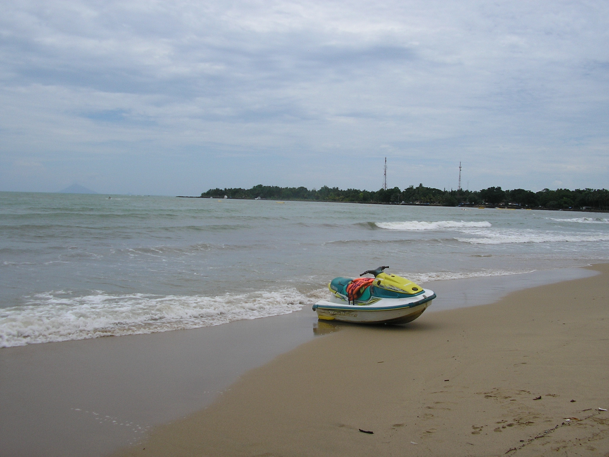 Abandoned Jetski at Carita Beach, Banten (Indonesia)